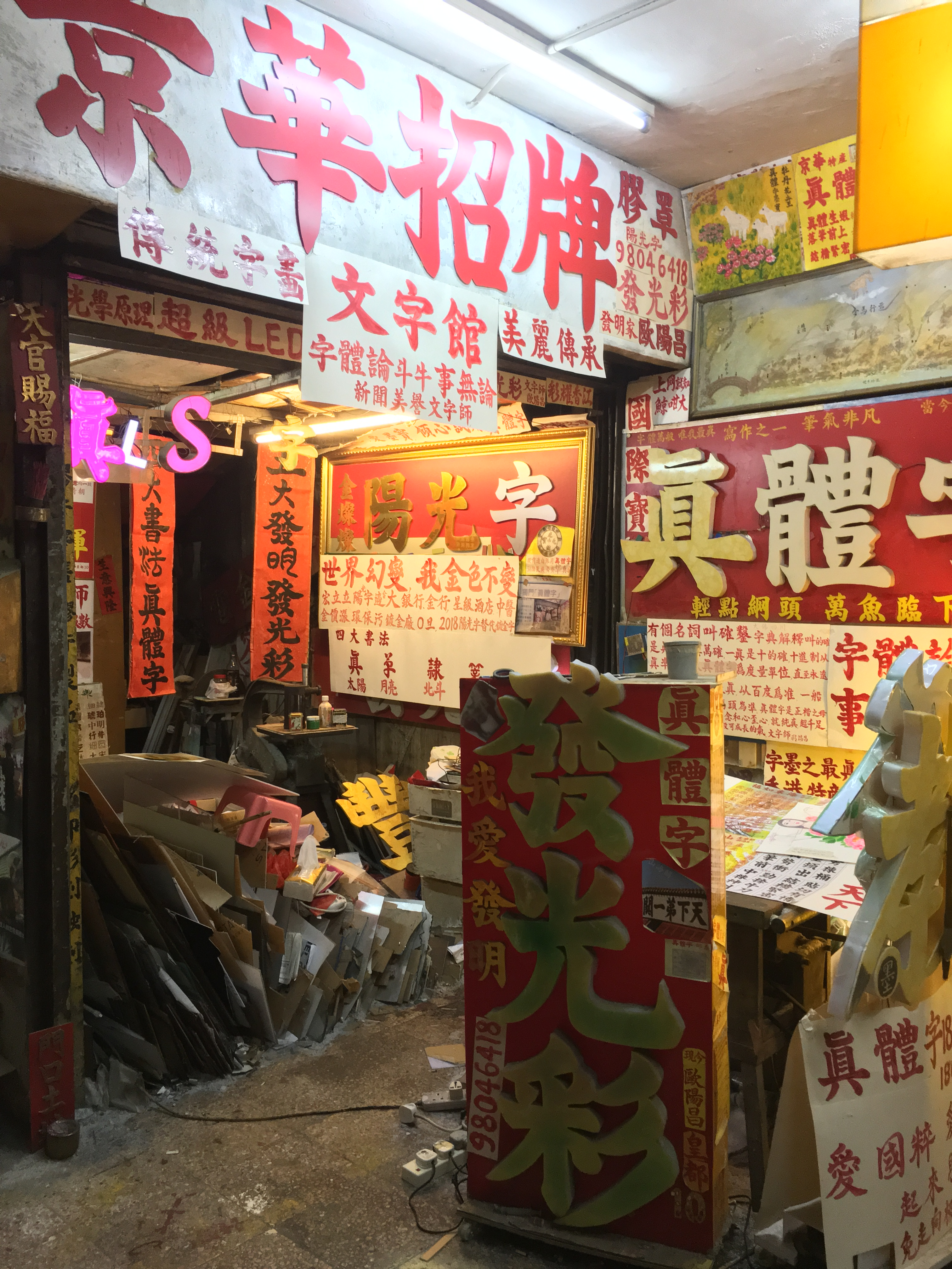 北角皇都戲院內經營近三十年的「京華招牌」